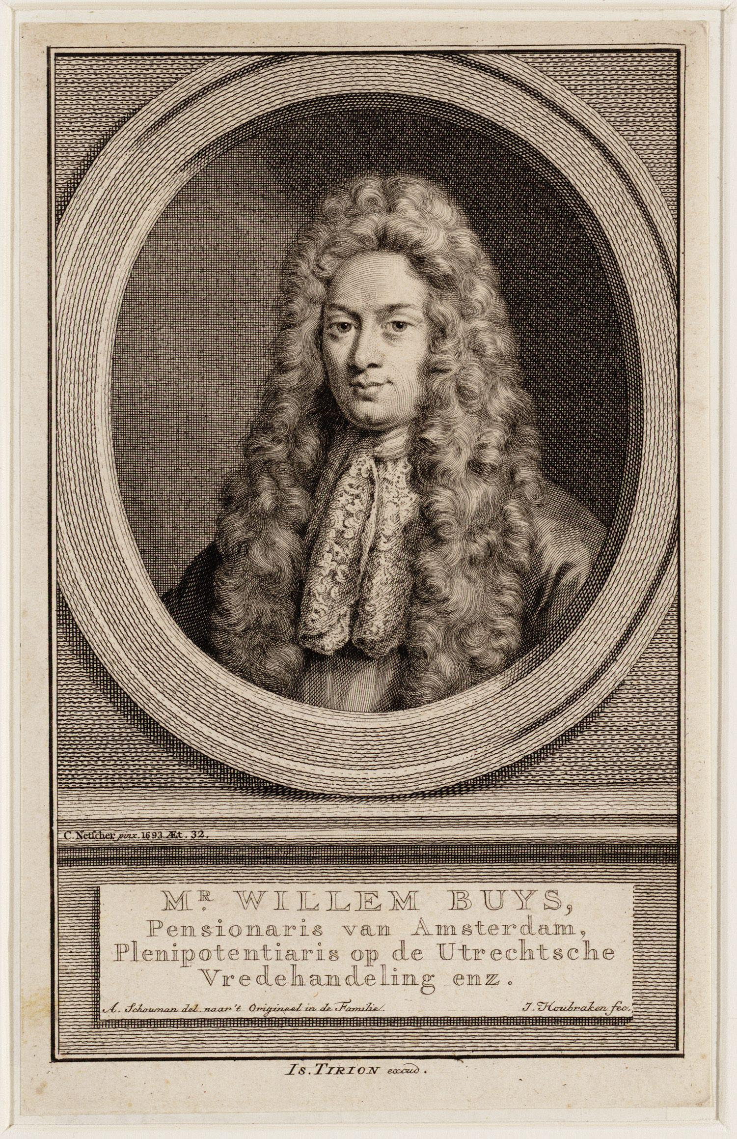 Portrait of Willem Buys (27-05-1661 / 18-02-1749). Print. Amsterdam, Stadsarchief Amsterdam, collectie tekeningen en prenten.